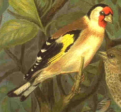 Stieglitz, zurechtgeschnitten durch User:Jimfbleak carduelis carduelis